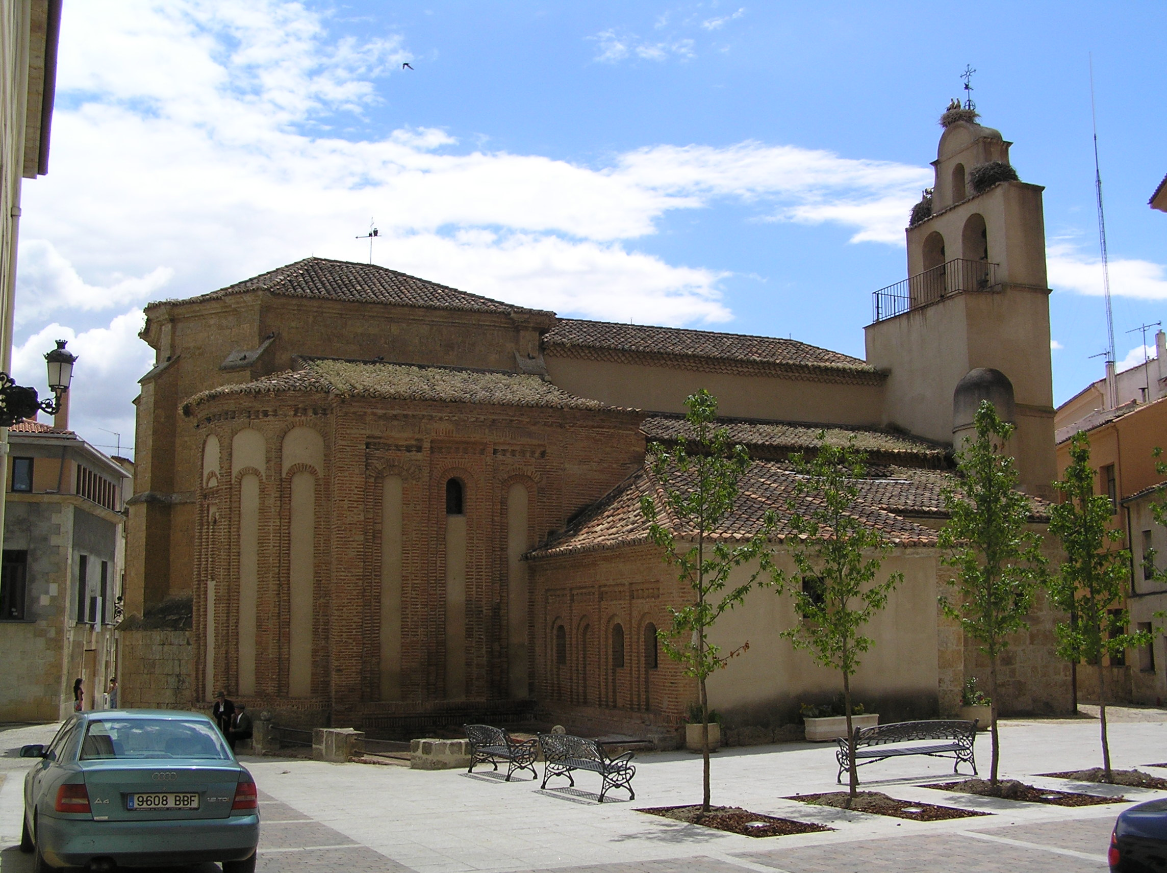 Iglesia de San Isidoro. Vista desde la plaza Campo del Pozo. Ciudad Rodrigo (provincia de Salamanca, España)